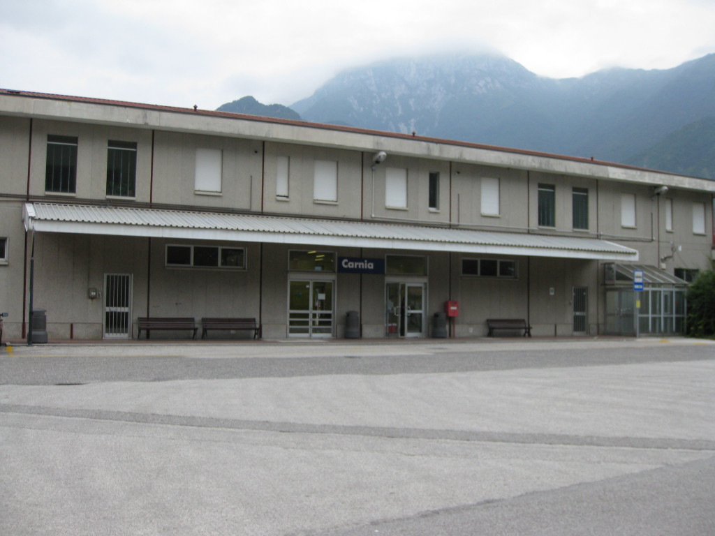 Stazione ferroviaria di Carnia sulla Pontebbana